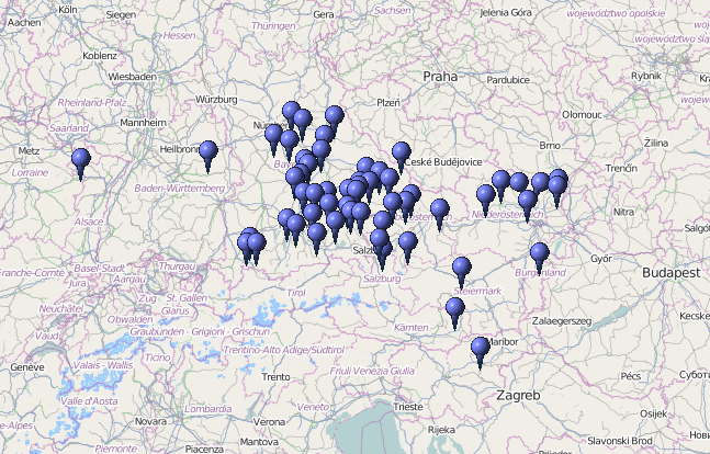 Verbreitung des Patroziniums "Hl. Koloman"